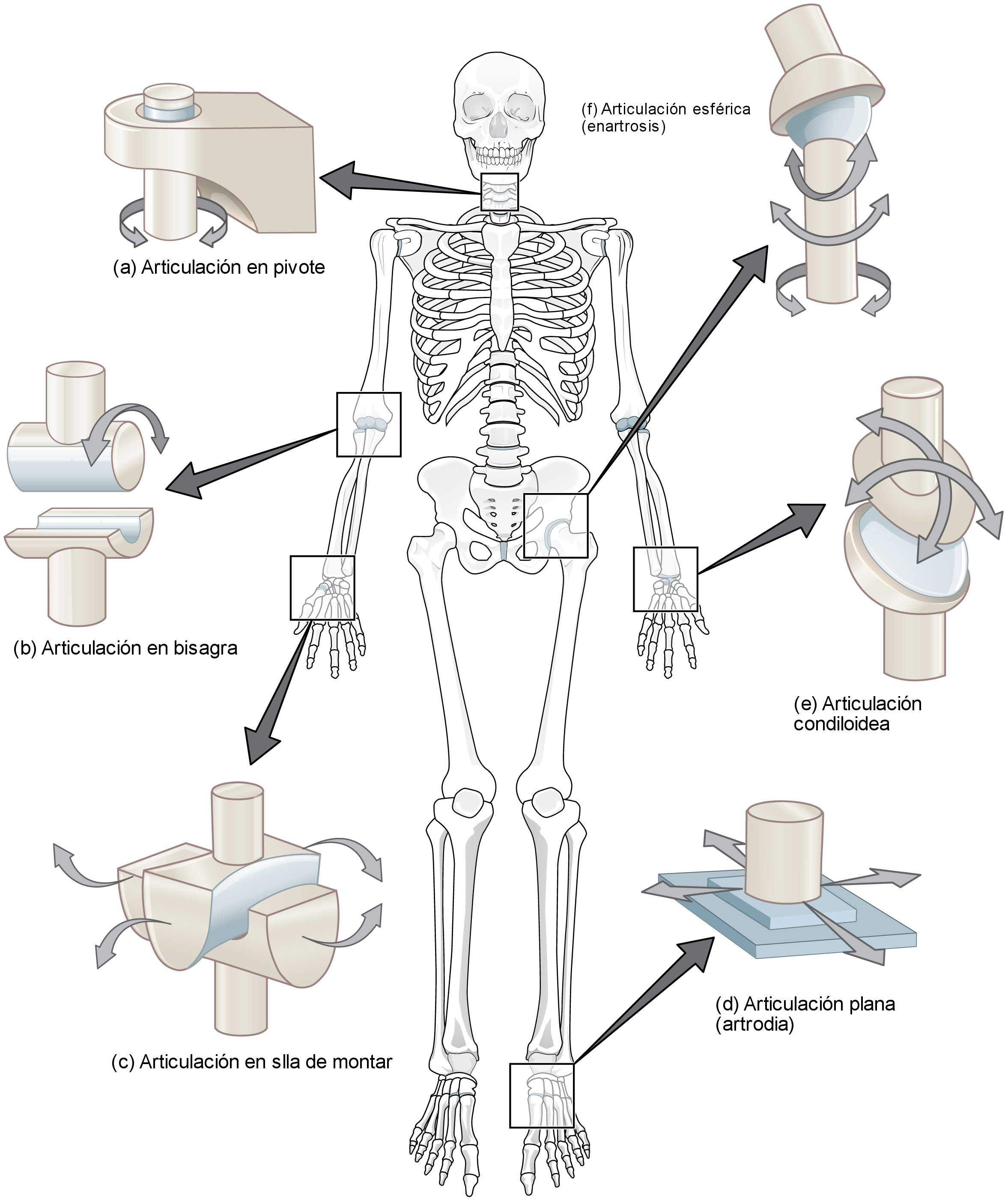 Esquema en el que se representa el esqueleto humano y los seis tipos de articulaciones sinoviales.